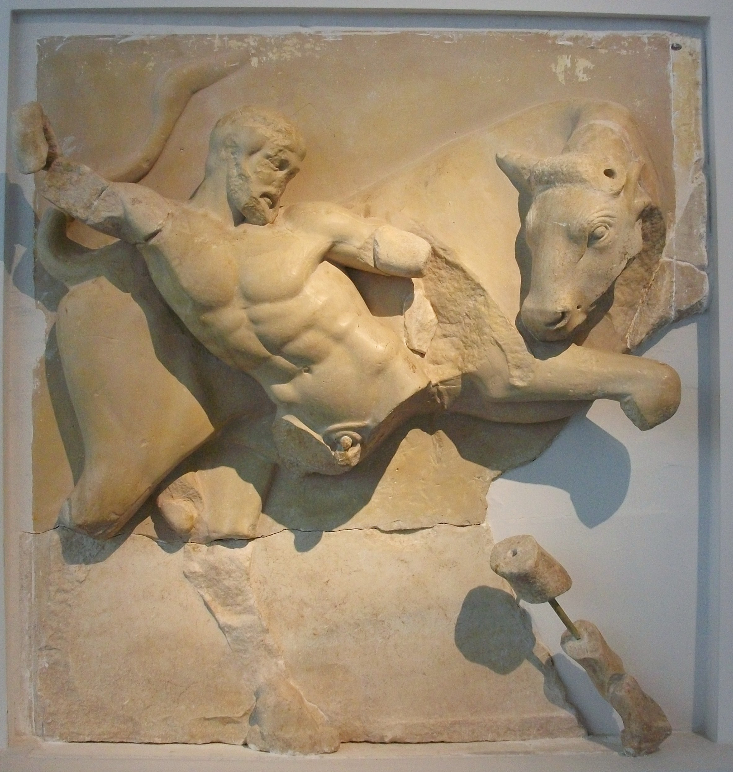 Mètopa del temple de Zeus d'Olímpia amb representació del bou de Creta (Museu Arqueològic d'Olímpia).